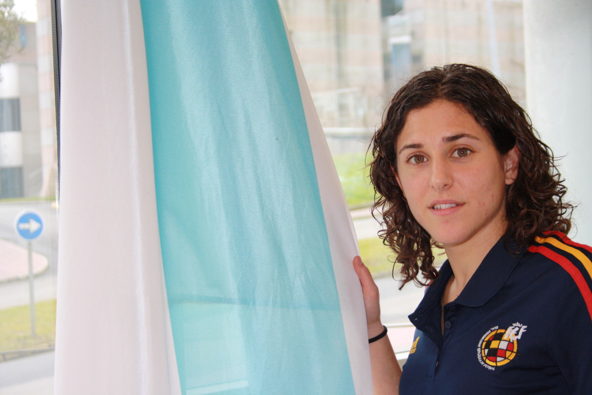 Verónica Boquete nunha entrevista no 2012.